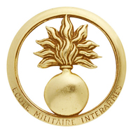 Insigne de béret d l'Ecole militaire int